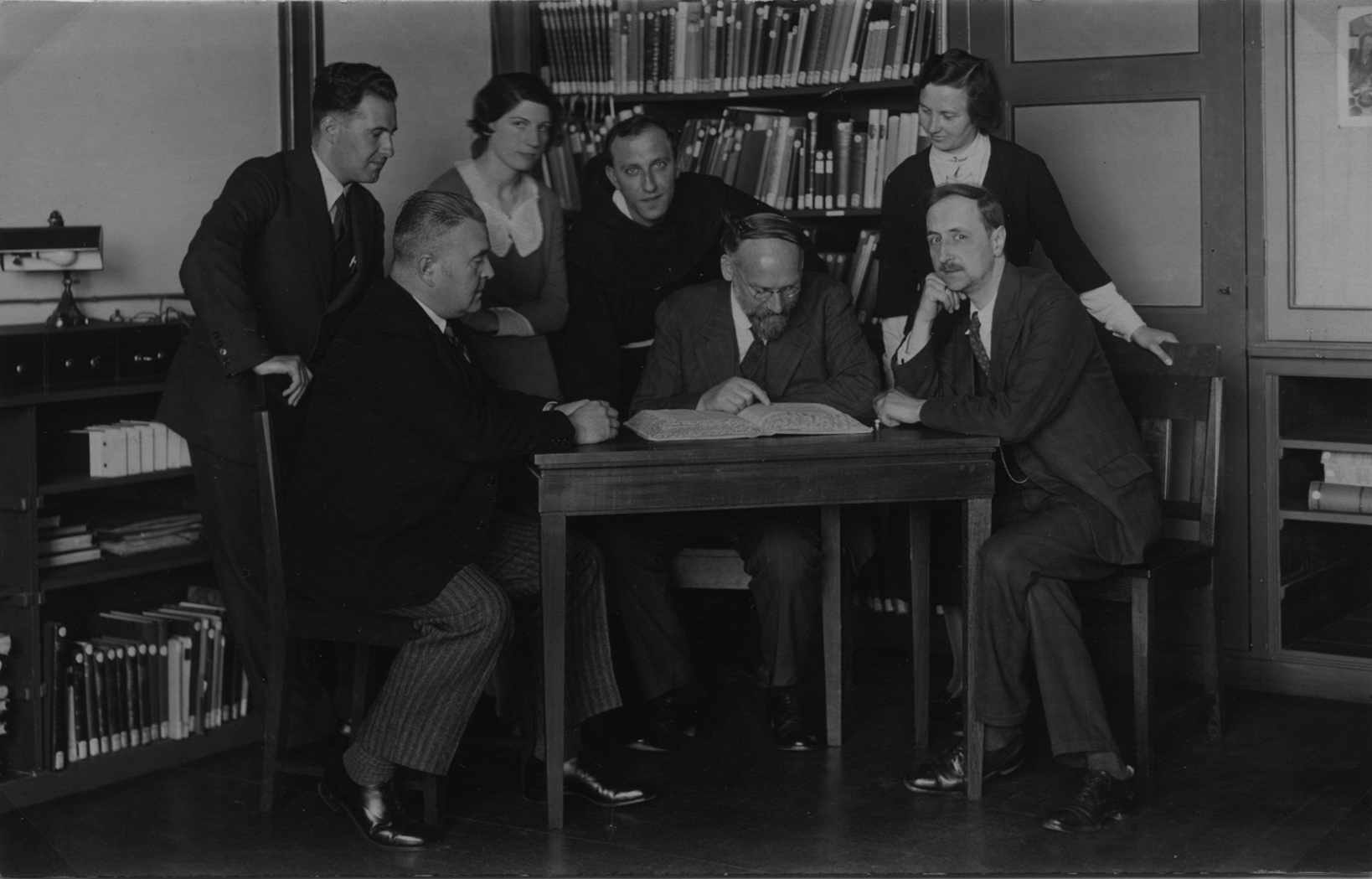 "Professor Brom met zijn eerste 4 leerlingen. Jan de Jong (links), van Rijckervorsel, Knipping en Smits"